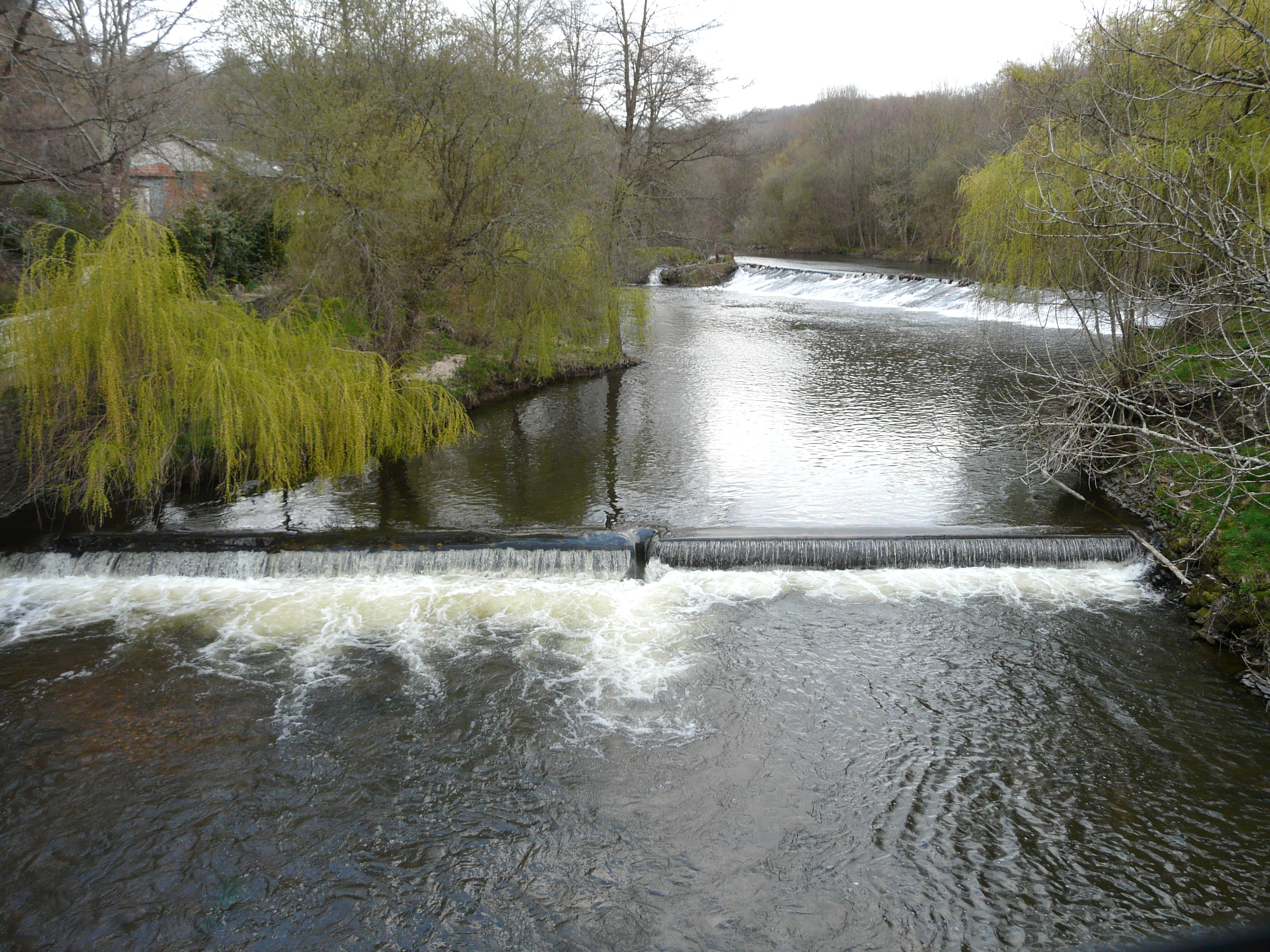 Rivière l'Isle aux pont des Castilloux, en limite de Nantheuil (à gauche) et Nanthiat (à droite), Dordogne, France.